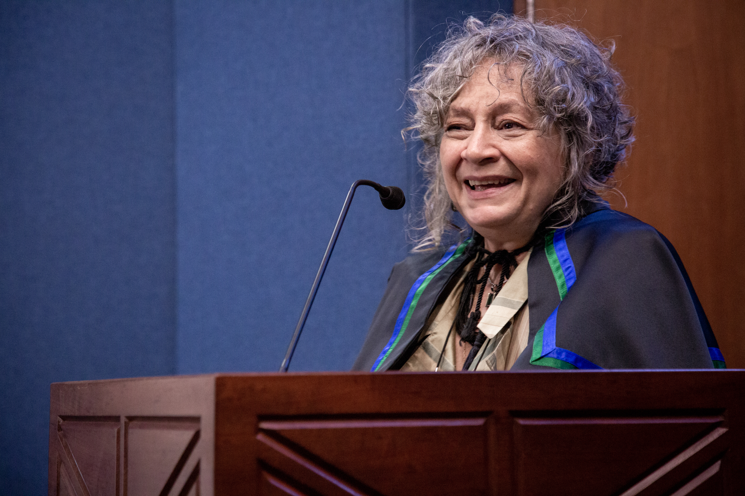 Brasília, 07 de Novembro de 2018. Cerimônia de outorga do título de professor emérito à professora Rita Segato. Distinção foi aprovada na 449ª reunião do Consuni, em março de 2018. Confira a matéria completa no portal da UnB: Foto: Beto Monteiro / Secom UnB. ATENÇÃO – As informações, as fotos e os textos podem ser usados e reproduzidos, desde que a fonte seja devidamente citada e que não haja alteração de sentido em seus conteúdos. Créditos: nome do repórter/Secom UnB.